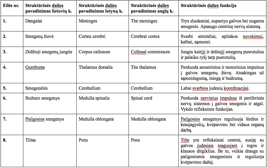 Žmogaus smegenų sudedamosios dalys ir funkcijos.